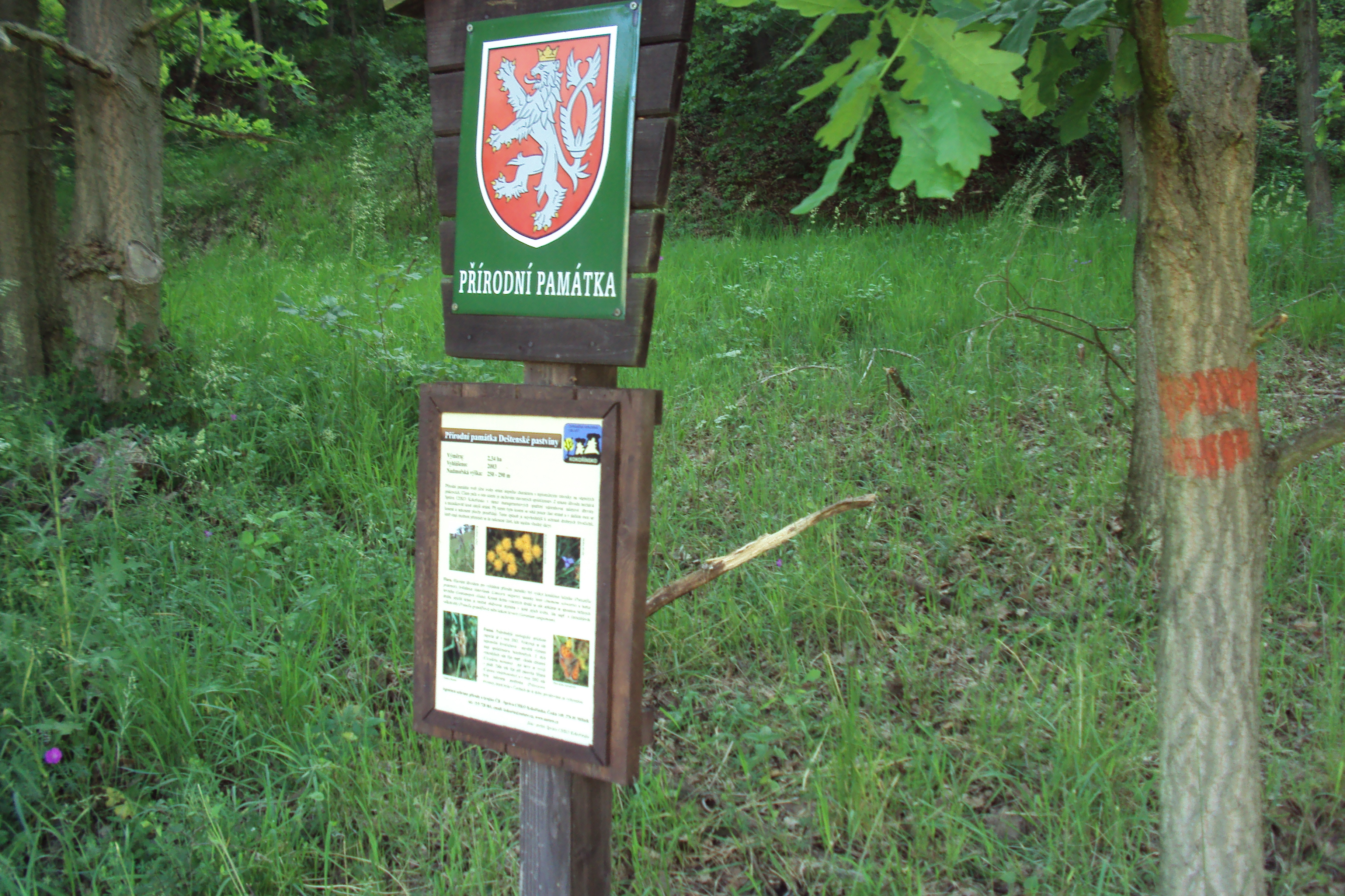 Přírodní památka Deštenské pastviny